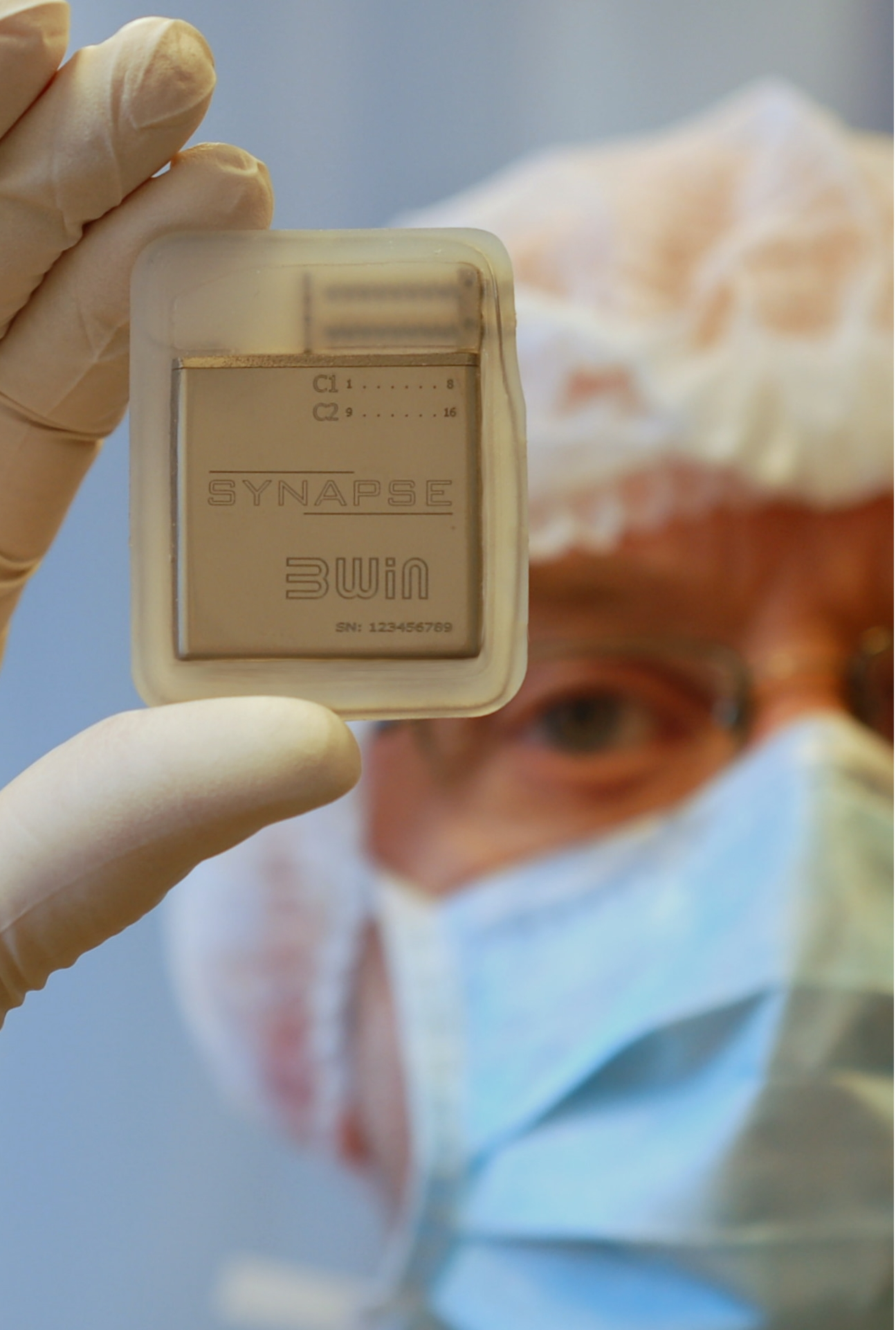 Synapse neurostimulator